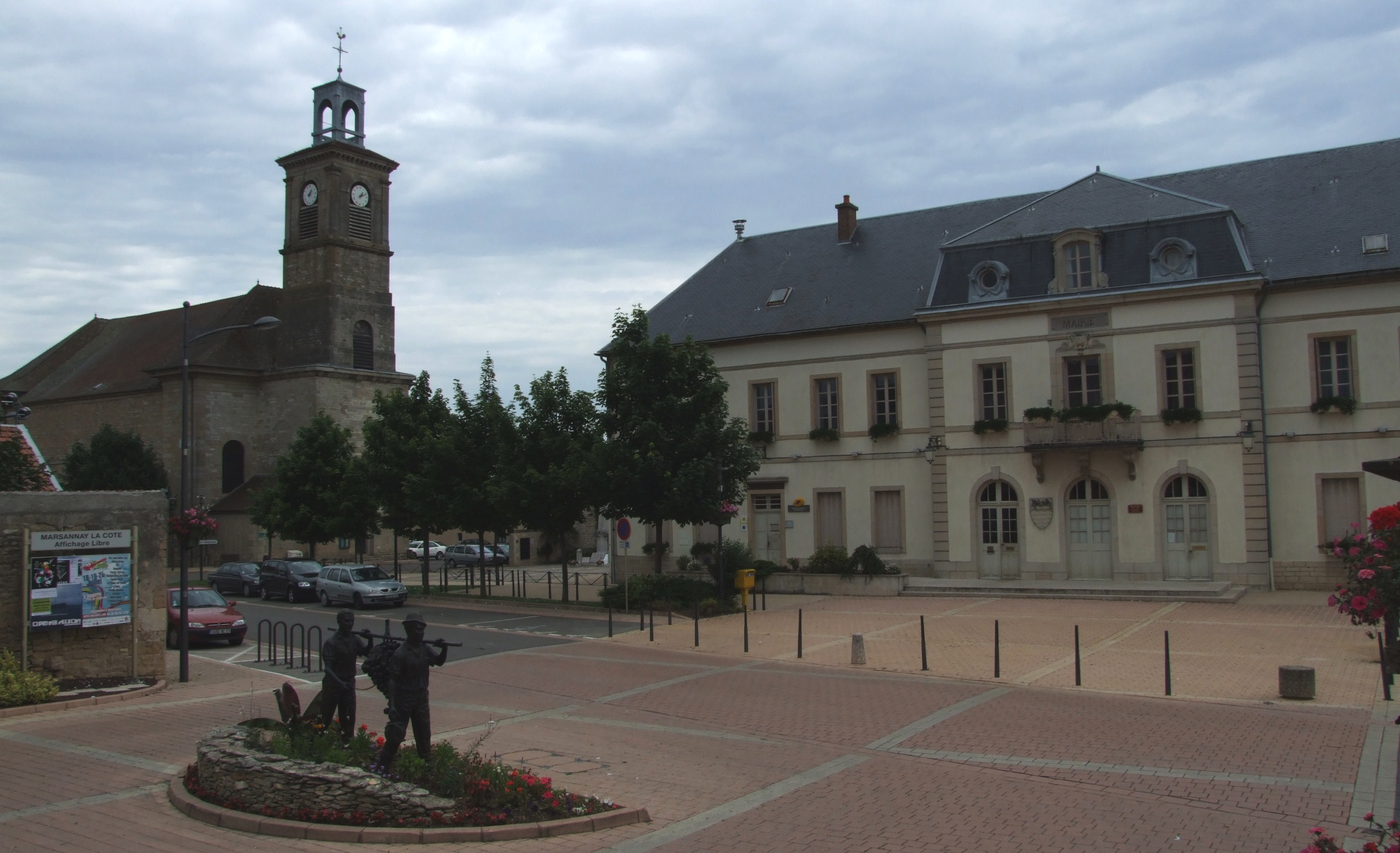 EMarsannay-la-Côte, Côte-d'Or, Bourgogne,FRANCE